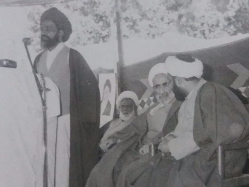 علامہ حسین بخش جاڑا علماء کرام کے ایک اجلاس میں